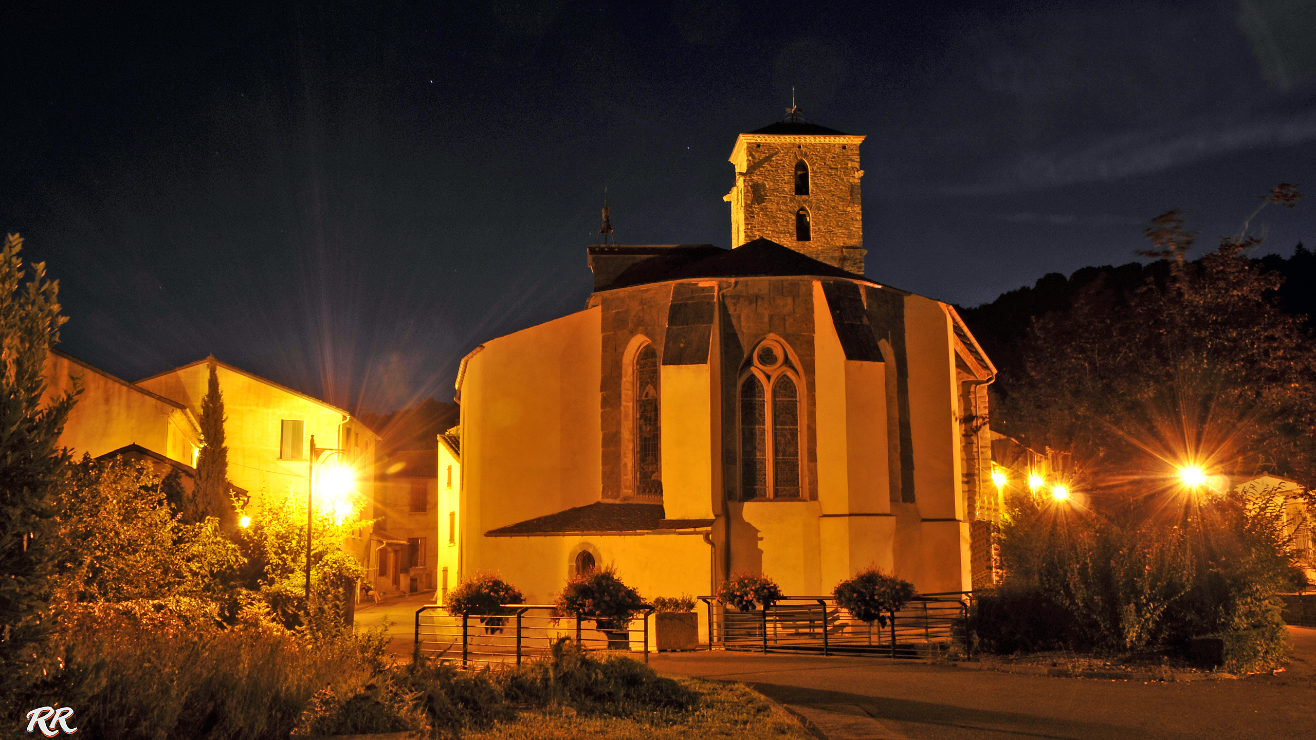 L'église la nuit